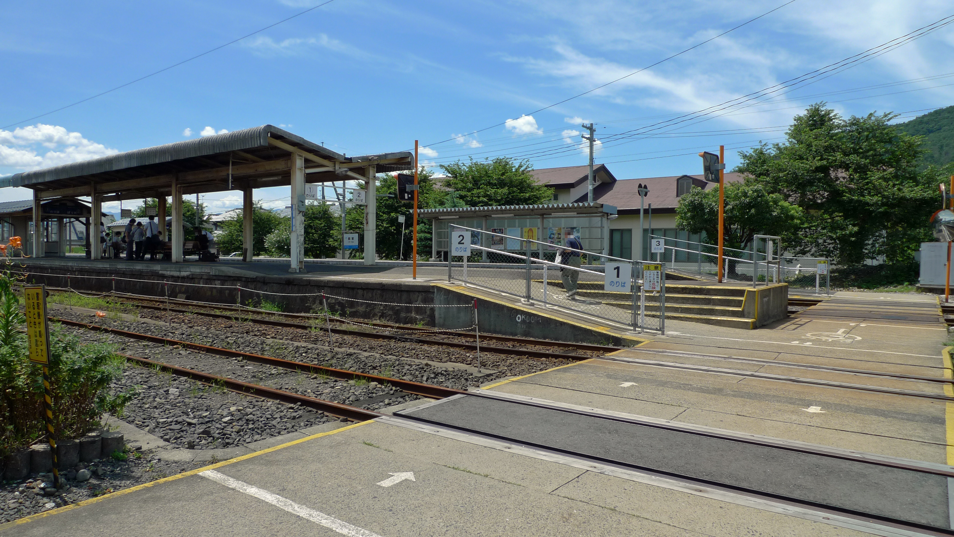 因美線・若桜鉄道線郡家駅ホーム